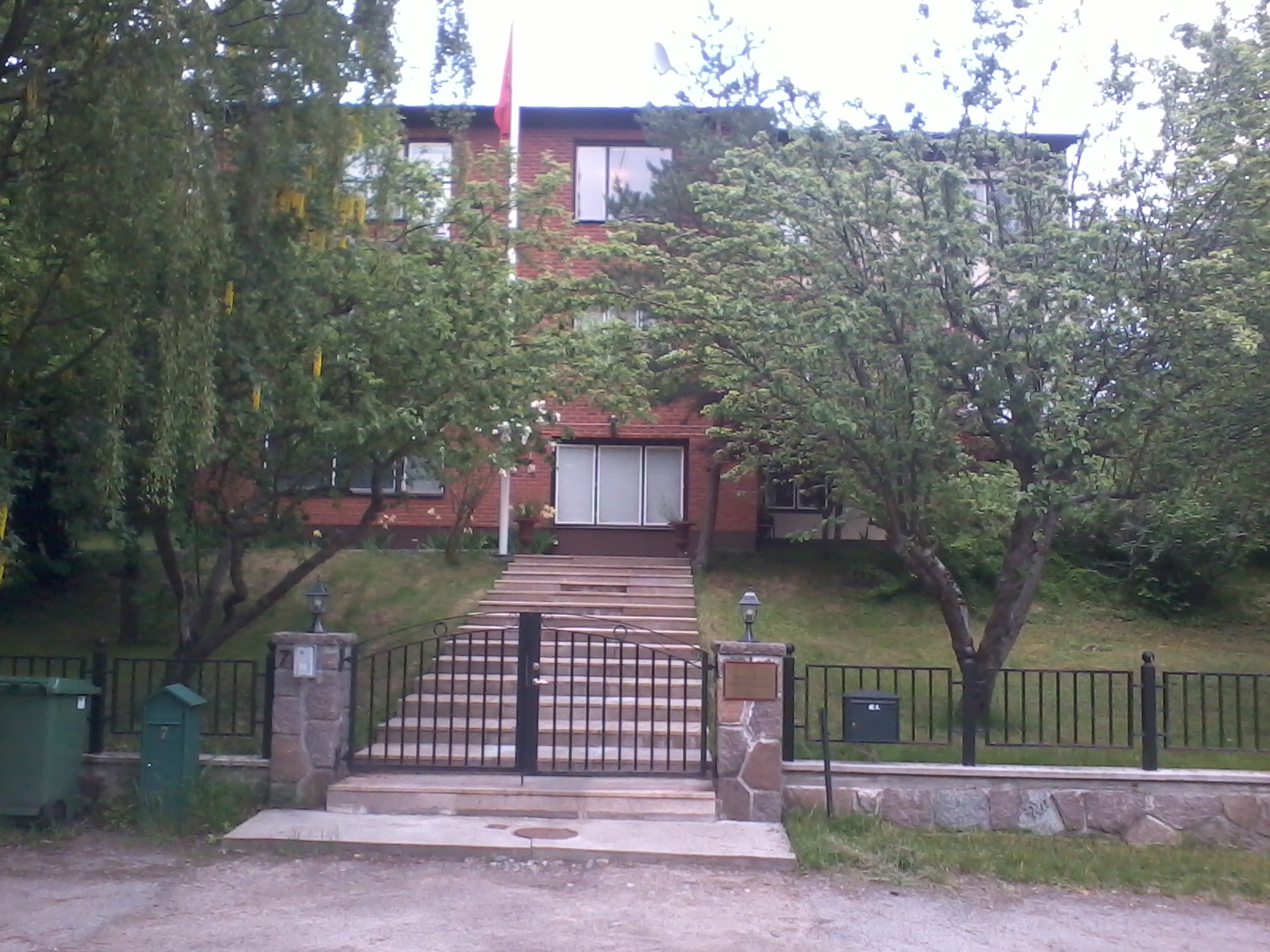 Albaniens ambassad på Lidingö